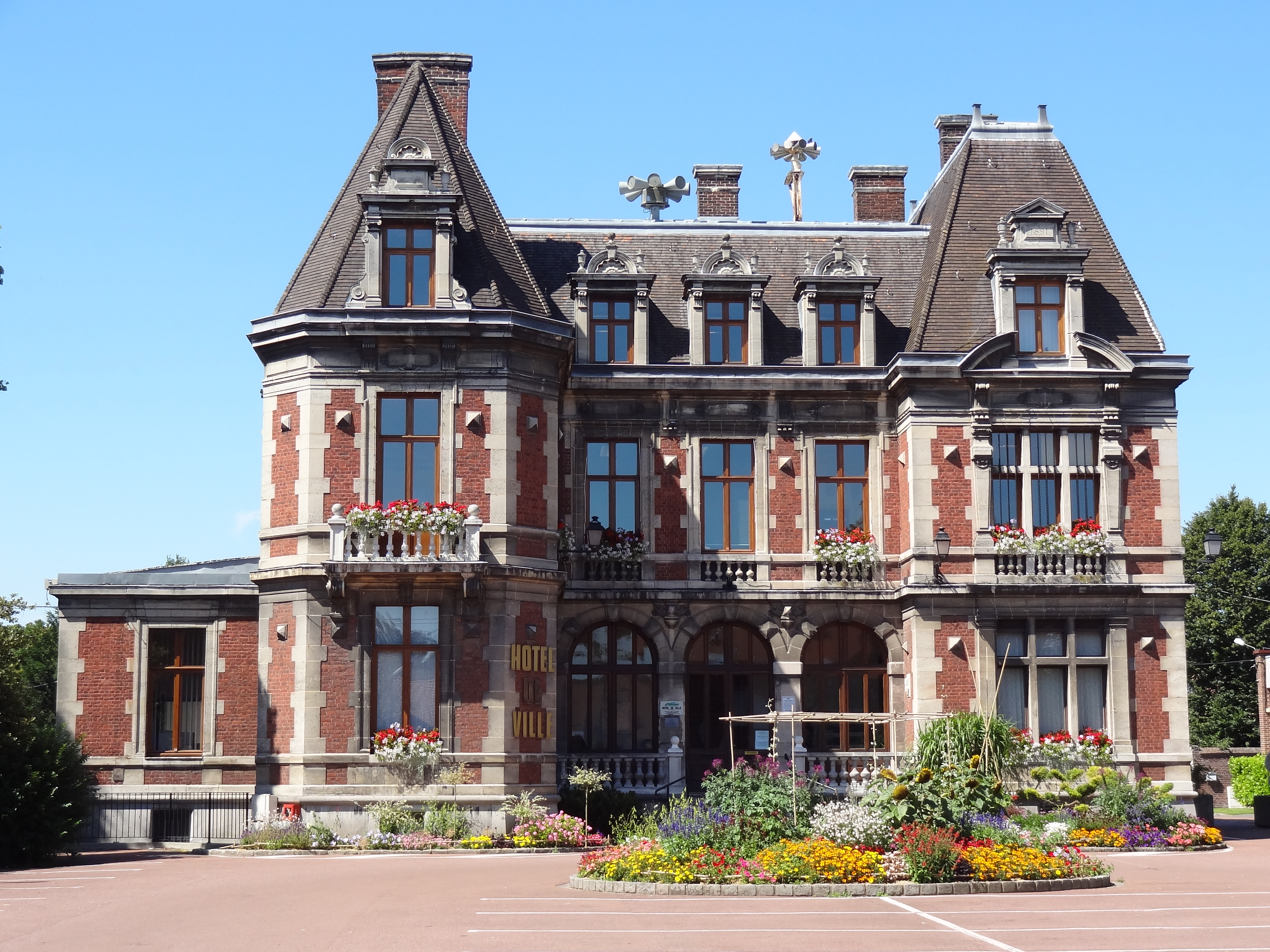 L'Hôtel de Ville de PHALEMPIN (FRANCE, NORD)